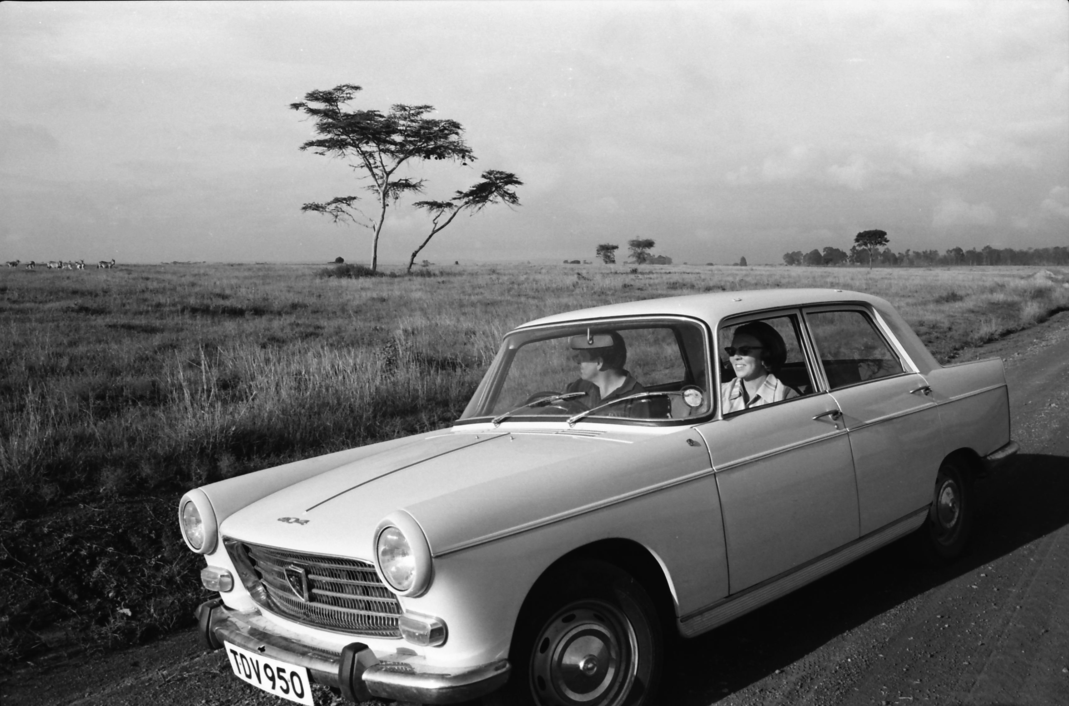 CollectieCollectie Fotoburo de BoerInventarisnummerNL-HlmNHA_1478_07766_02 K_26VervaardigerFotopersbureau de Boer TechniekFoto